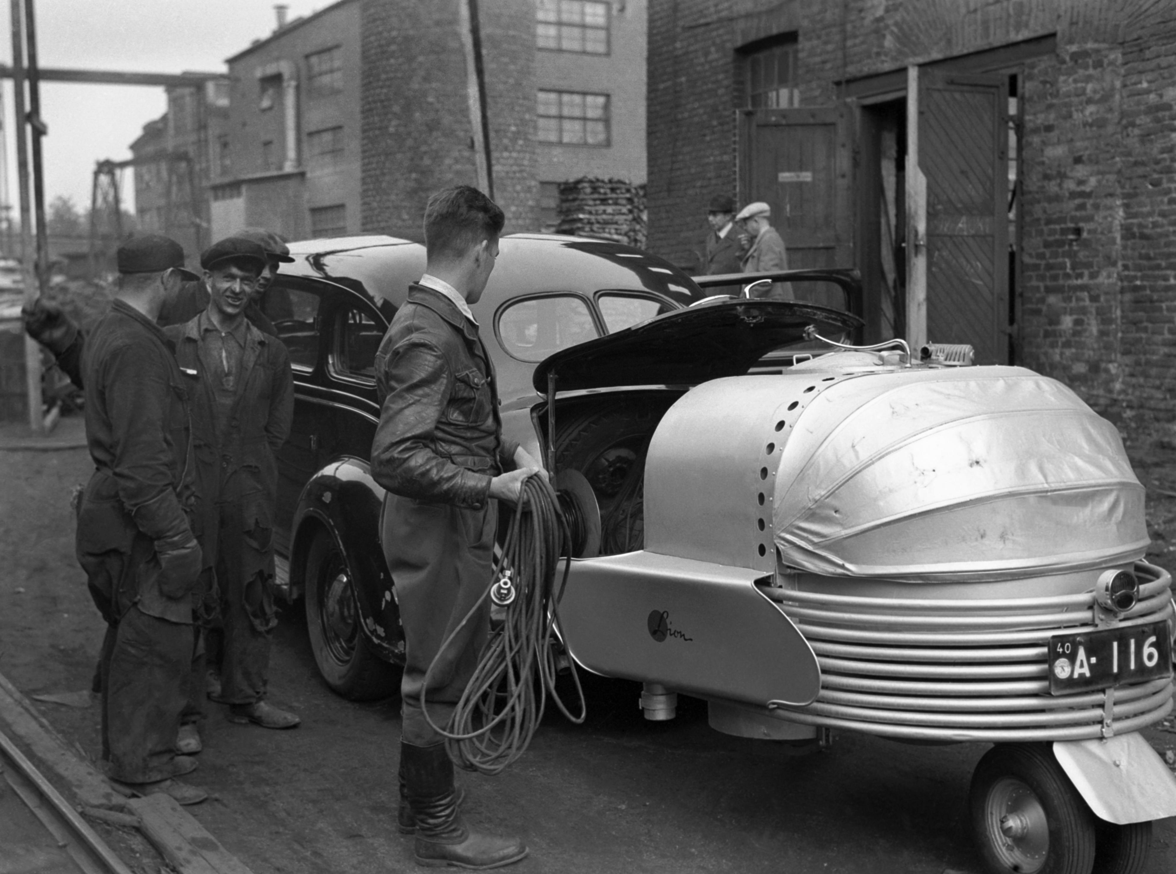 Helsingin Hietalahden telakan työntekijät ihailevat puukaasulla toimivaa radion ääniautoa, jonka taakse on kiinnitetty häkäpönttö.